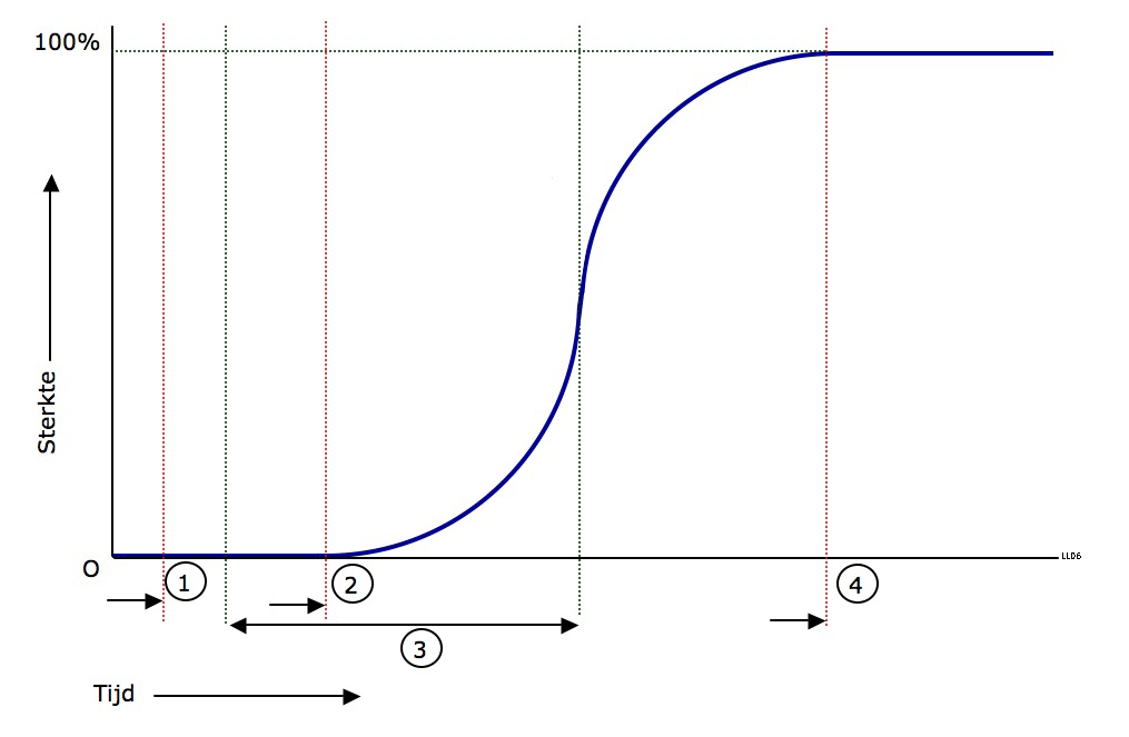 Grafiek die verschillende begrippen in het lijmproces verduidelijkt. Januari 2007 Laurens van Lieshout.